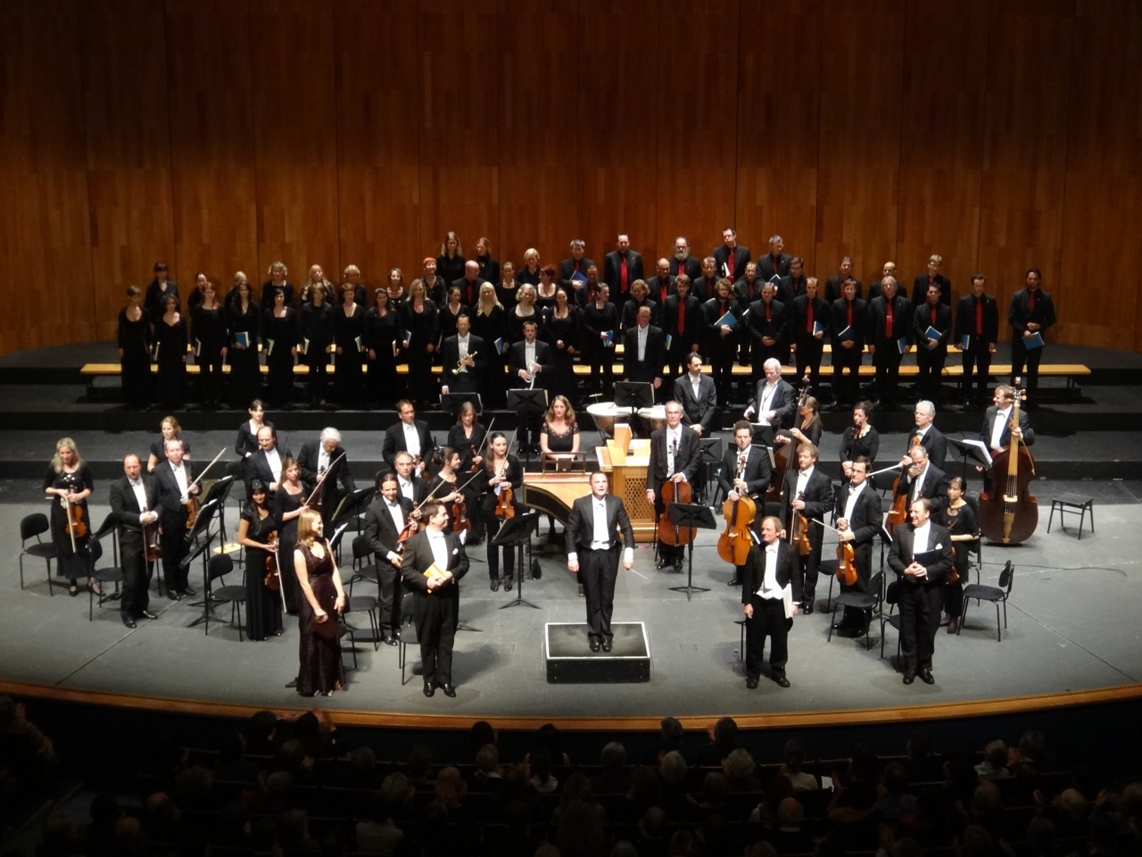 Salzburg, Großes Festspielhaus: Konzert der Salzburger Kulturvereinigung "Messiah" mit dem Mozarteumorchester Salzburg (Dirigent: Matthew Halls)